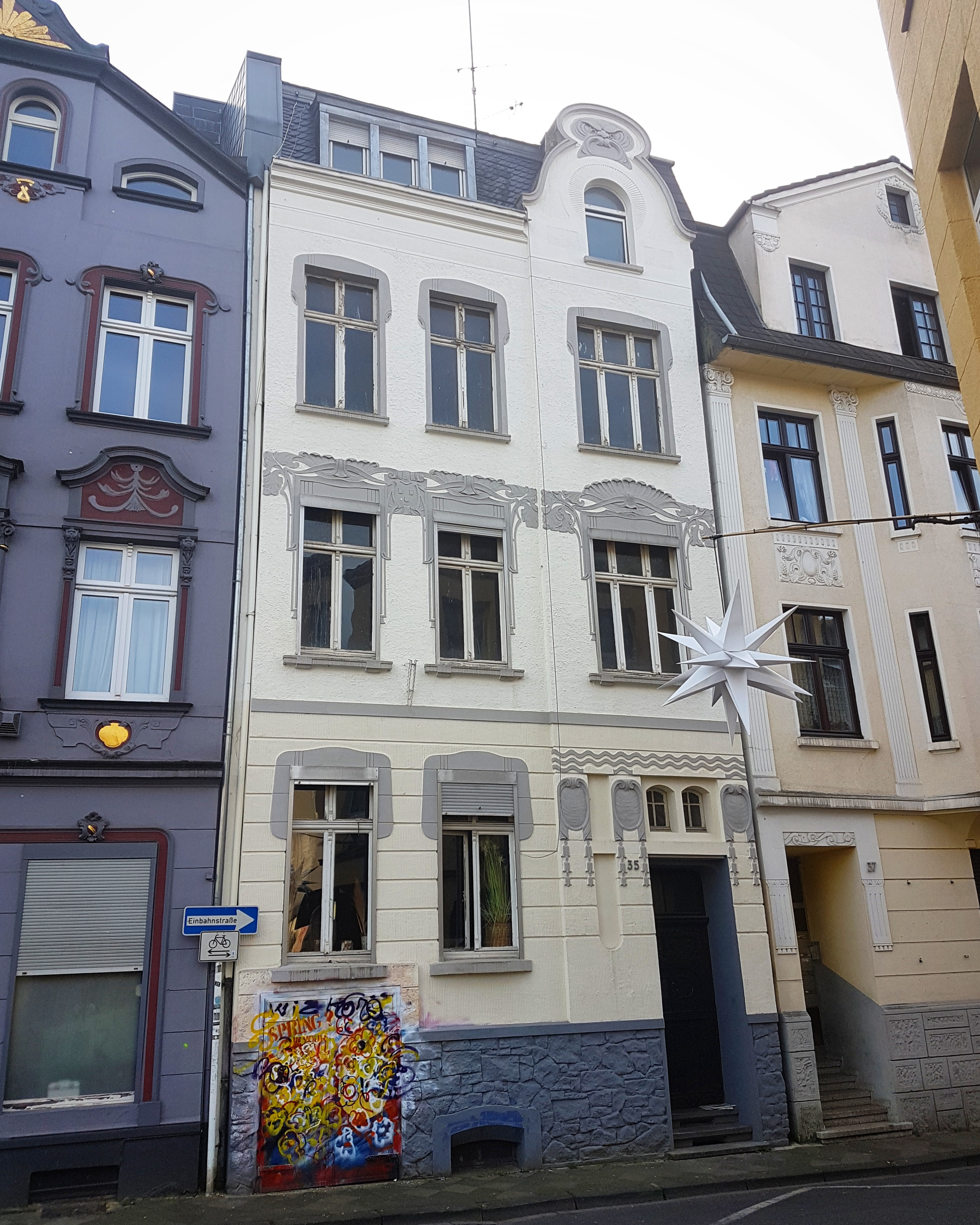 Gasthausstraße 35 im April 2018